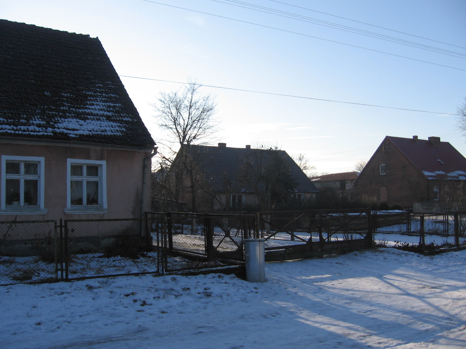 Wieś Przyborze